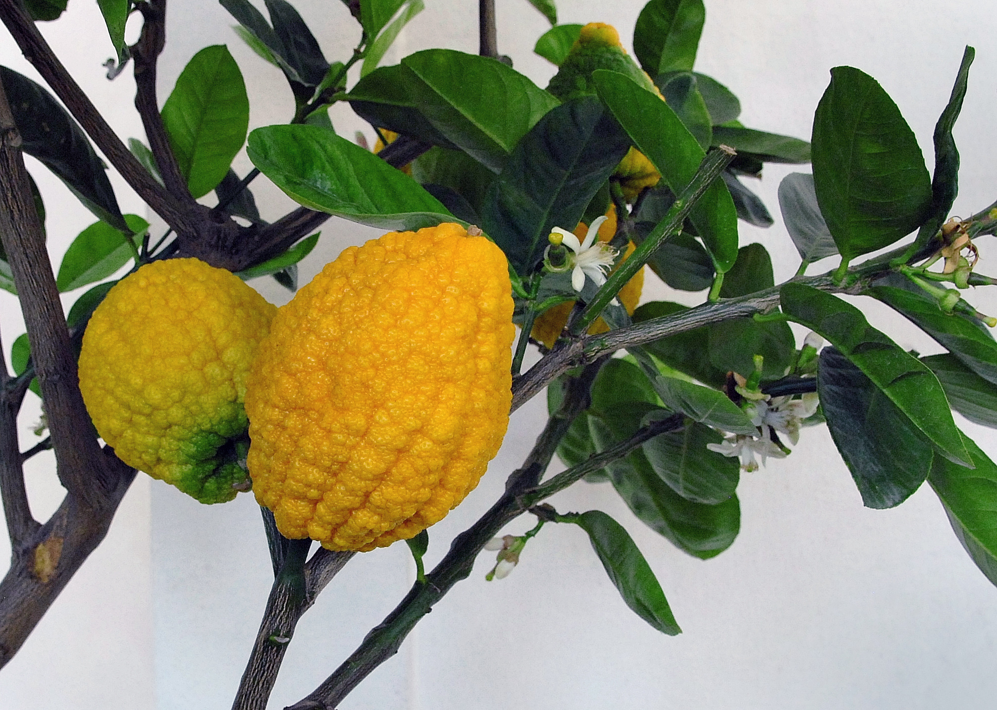 Chinesische Zedrat-Zitrone (Citrus medica 'Aurantiata') in der Ausstellung der 12. Wiener Zitrustage in der Orangerie Schönbrunn, 2012. Gleichzeitiger Frucht- und Blütenstand.